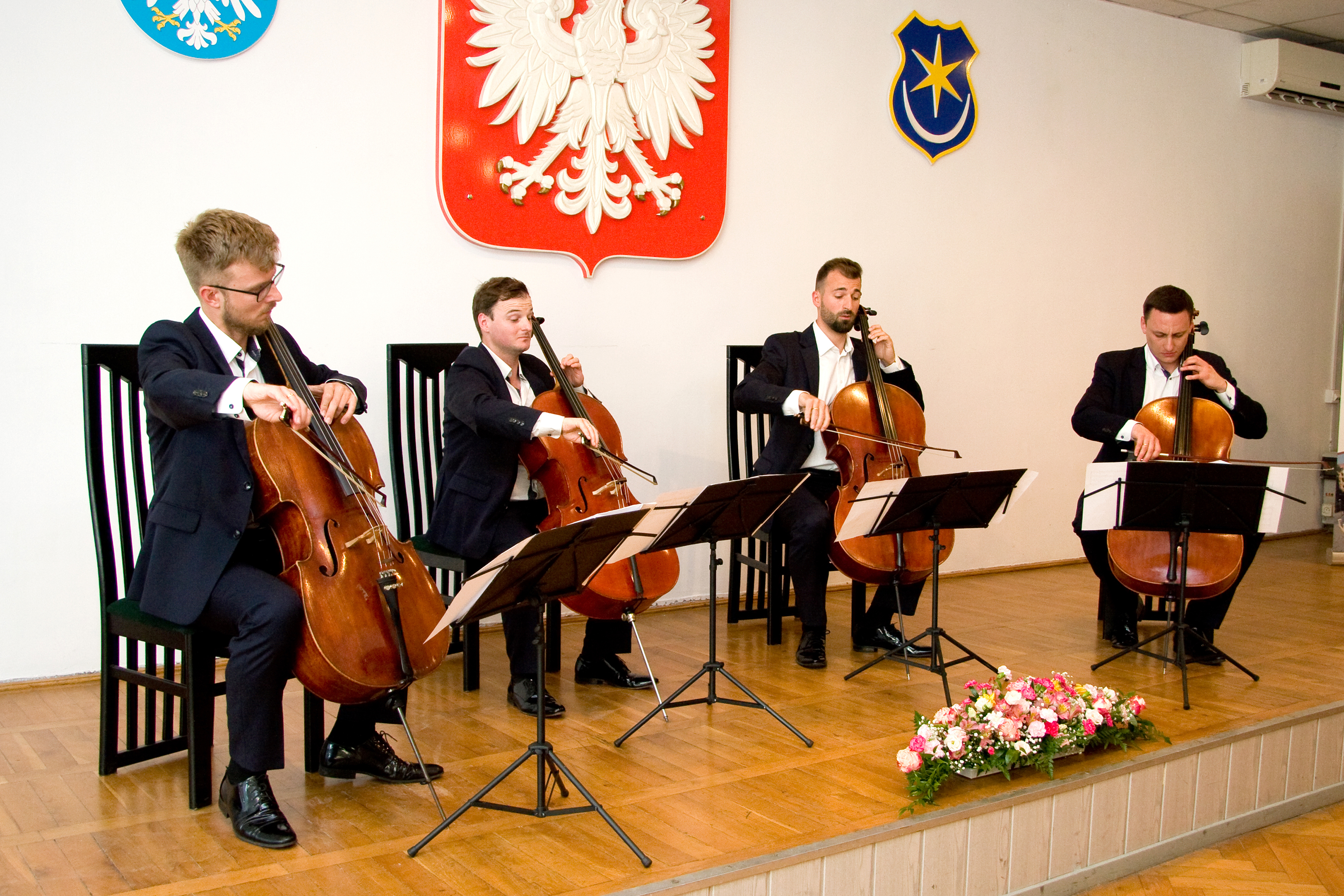 Artyści Muzycy Polish Cello Quartet podczas koncertu z okazji Jubileuszu 50-lecia Państwowej Szkoły Muzycznej I stopnia w Przeworsku .